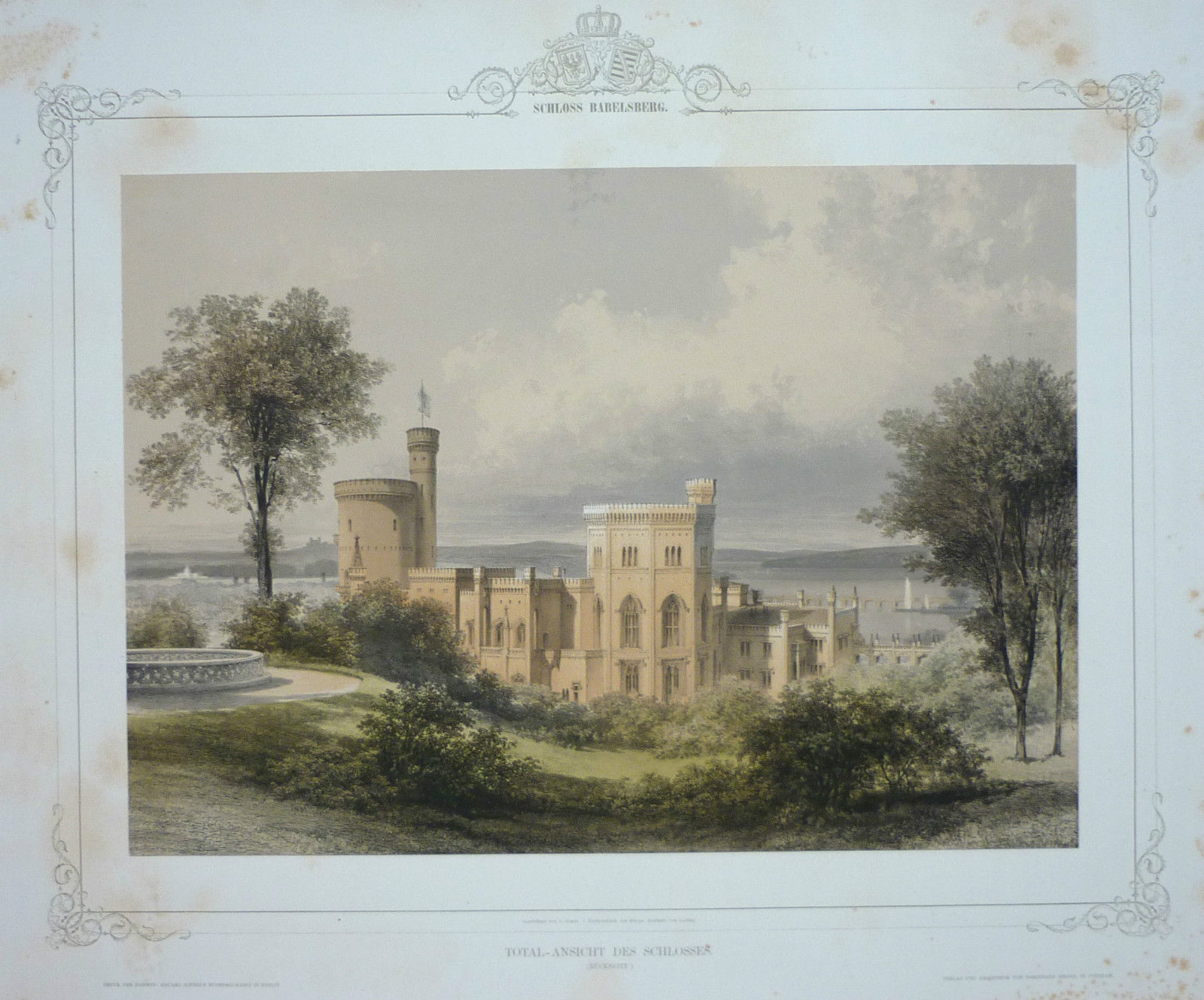 Schloss Babelsberg. Total-Ansicht des Schlosses (Rückseite). F. Riegel, Potsdam 1853, Farblithografie von Loeillot nach Carl Graeb, Bild: 27 × 37,5 cm, Blatt: 44,5 × 57,5 cm